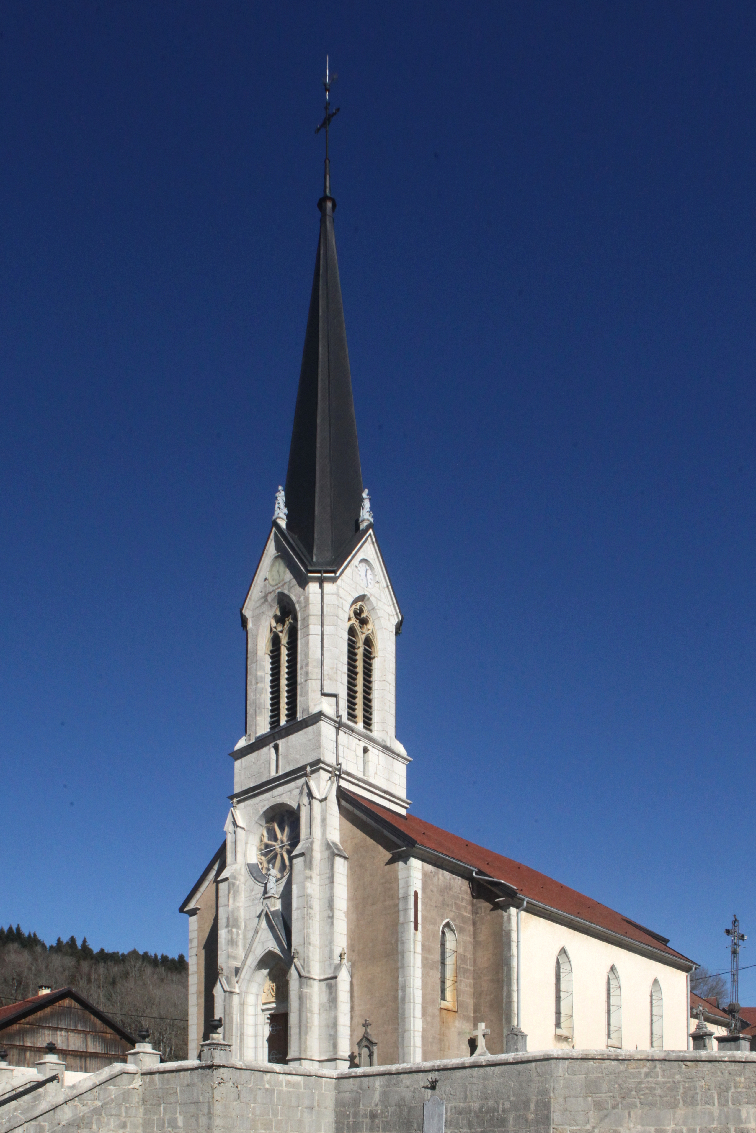 Eglise de Saint-Julien-lès-Russey.